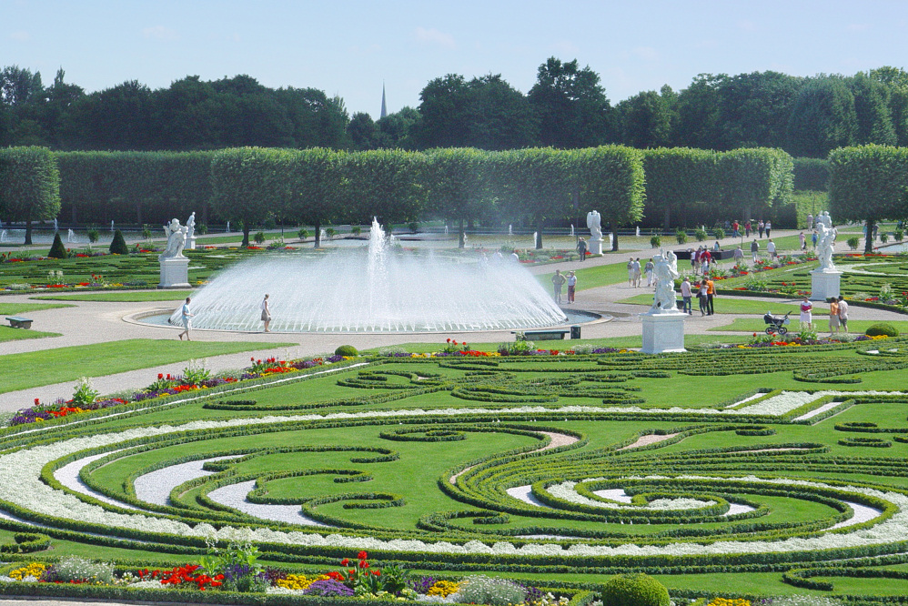 Großer Brunnen in den Herrenhäuser Gärten.